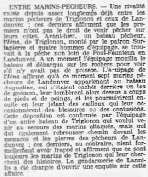 Une rixe entre pêcheurs de Landunvez et de Tréglonou (nommé à tort Triglonon dans cet article) en 1911 (journal L'Ouest-Éclair, n° du 17 avril 1911).